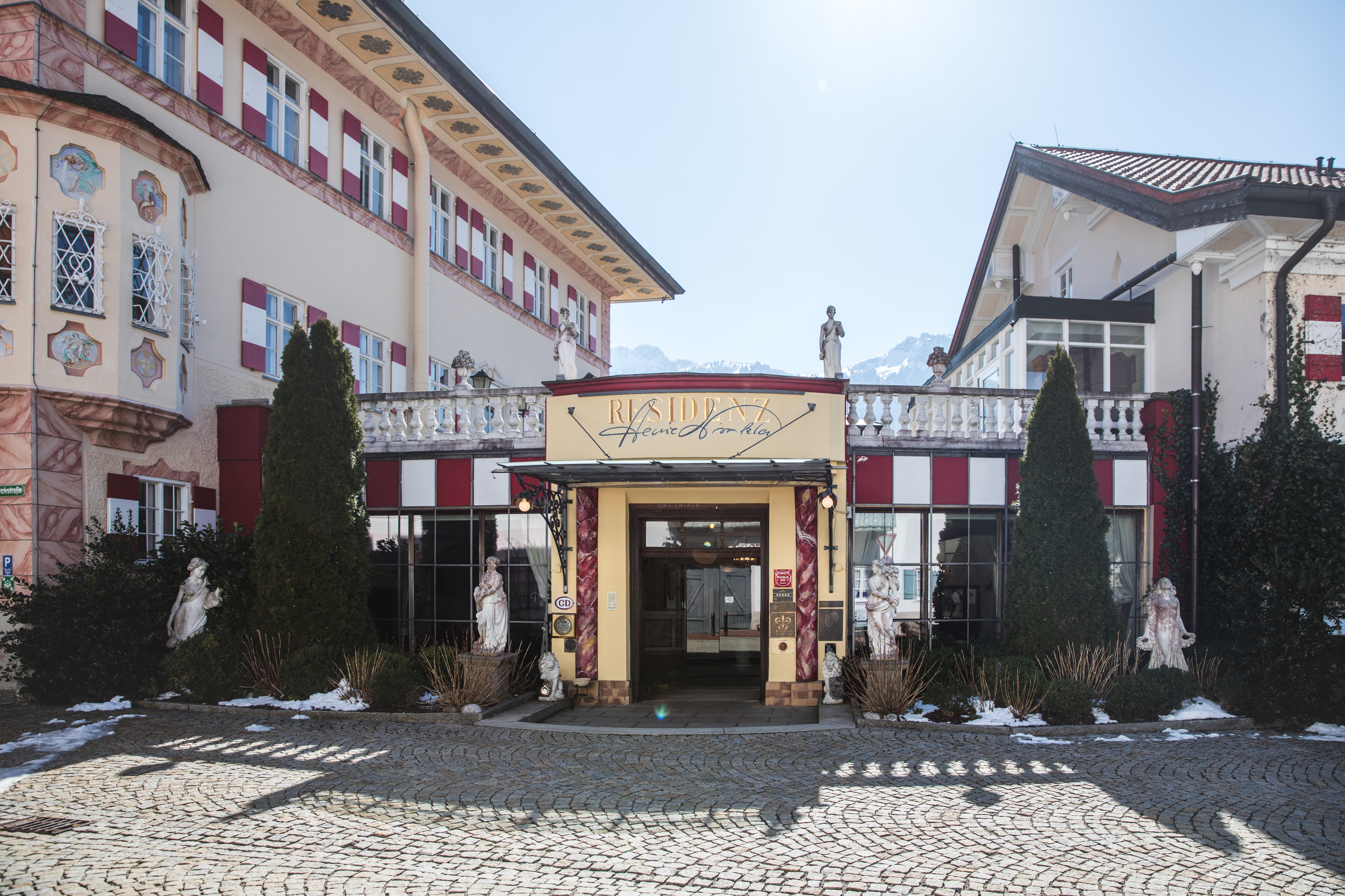 AV4A1522